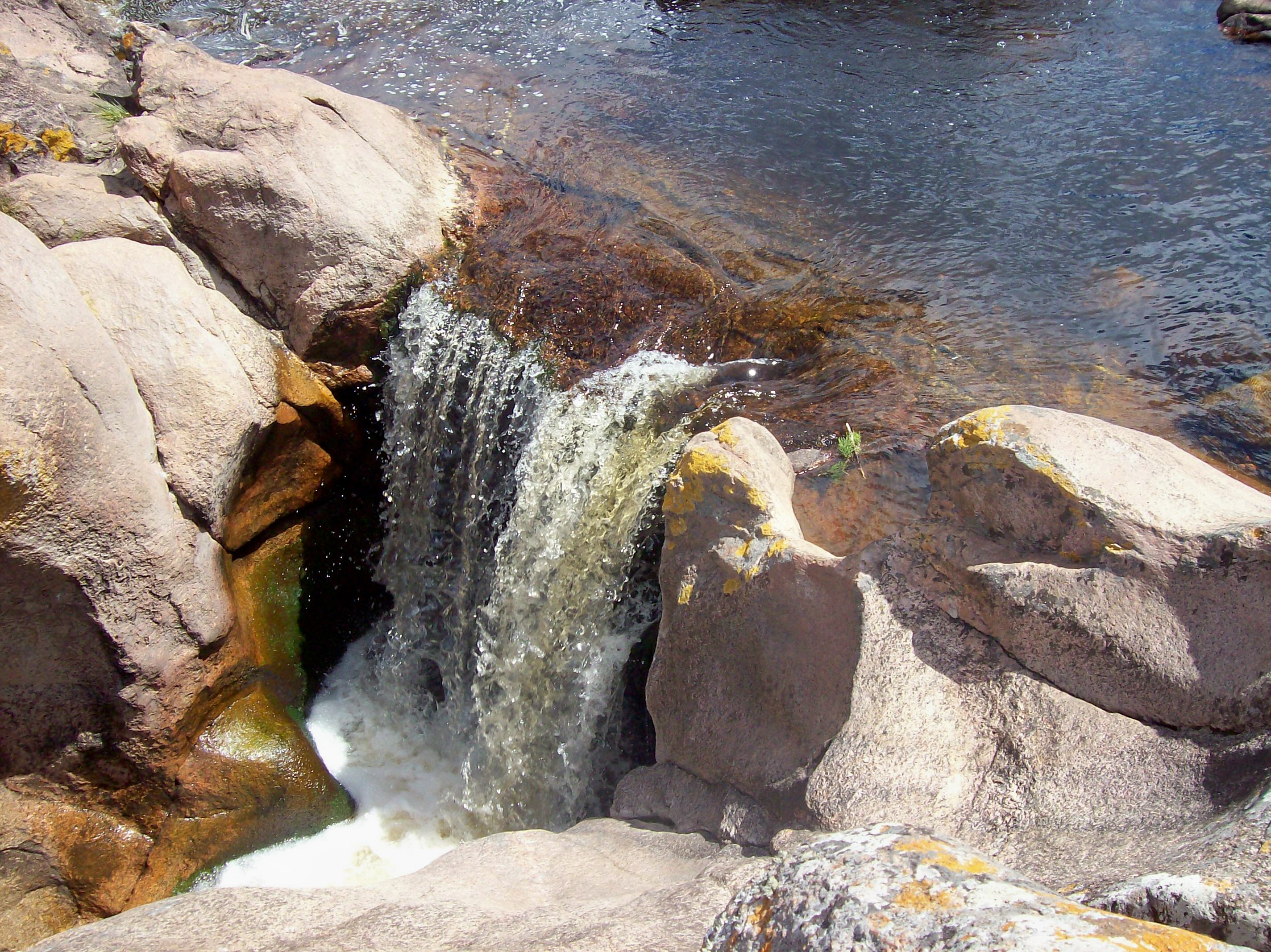 Cascada de Olaen en las afueras de Valle Hermoso, provincia de Córdoba, Argentina. Foto tomada de arriba hacia abajo